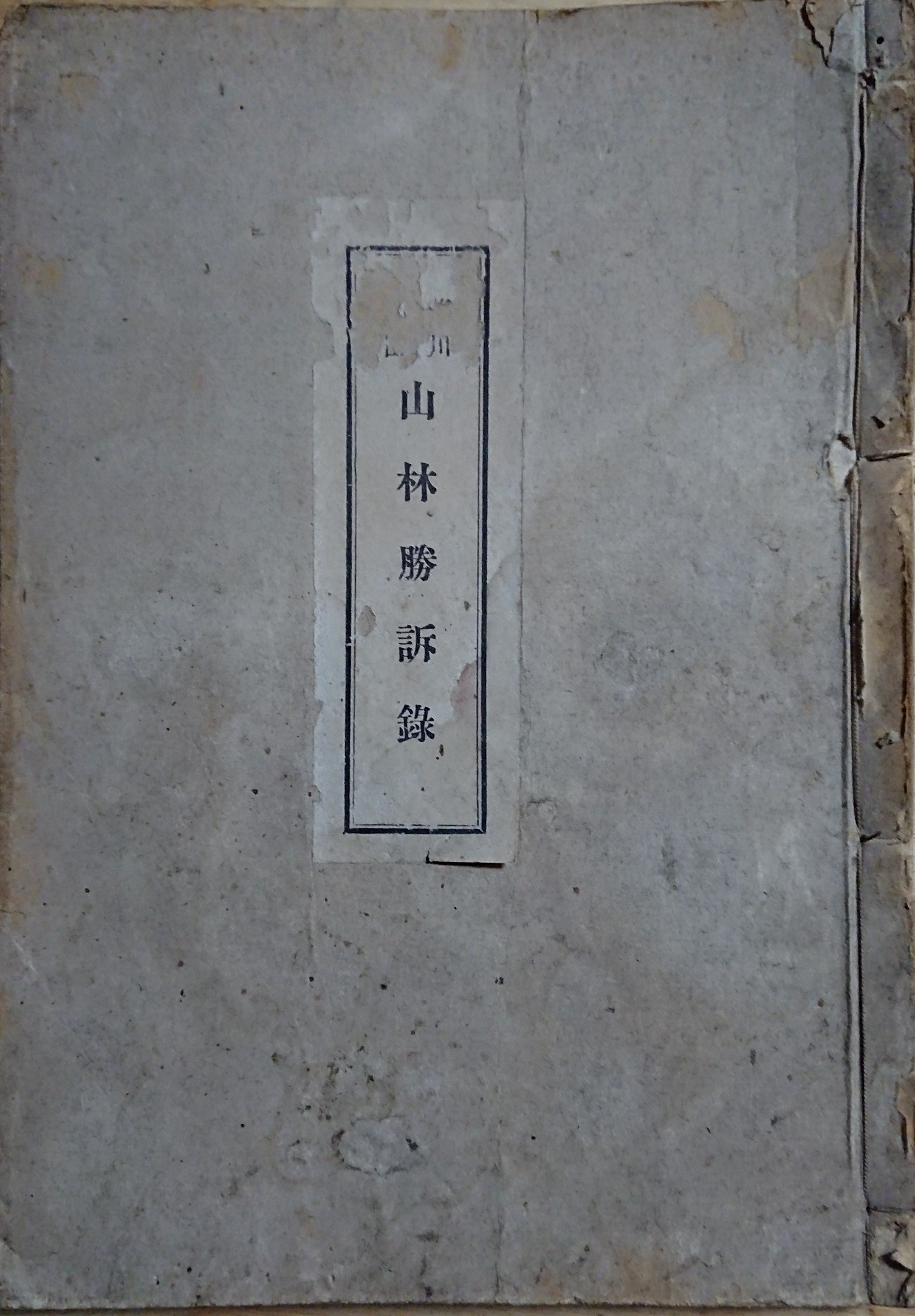 白鳥鴻彰の著書『荒川高田山林勝訴録』の表紙